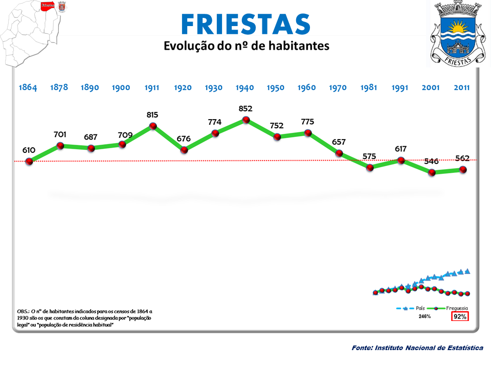 Censos 1864/2011